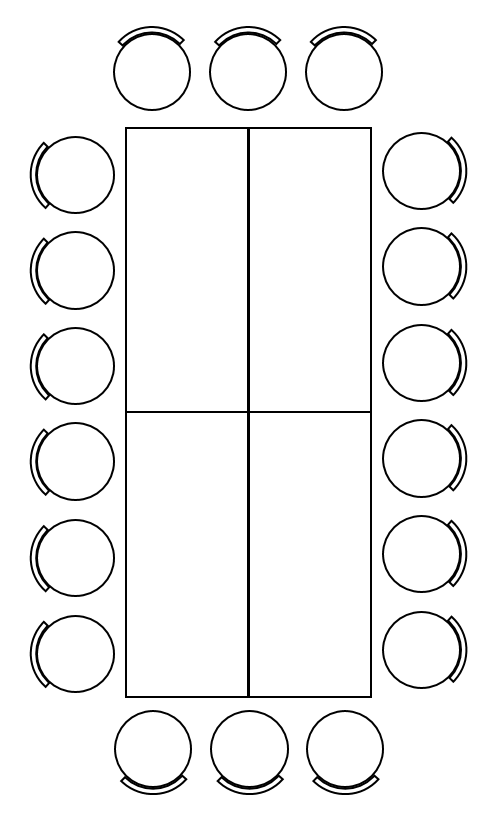 Bordoppsett Kongebord